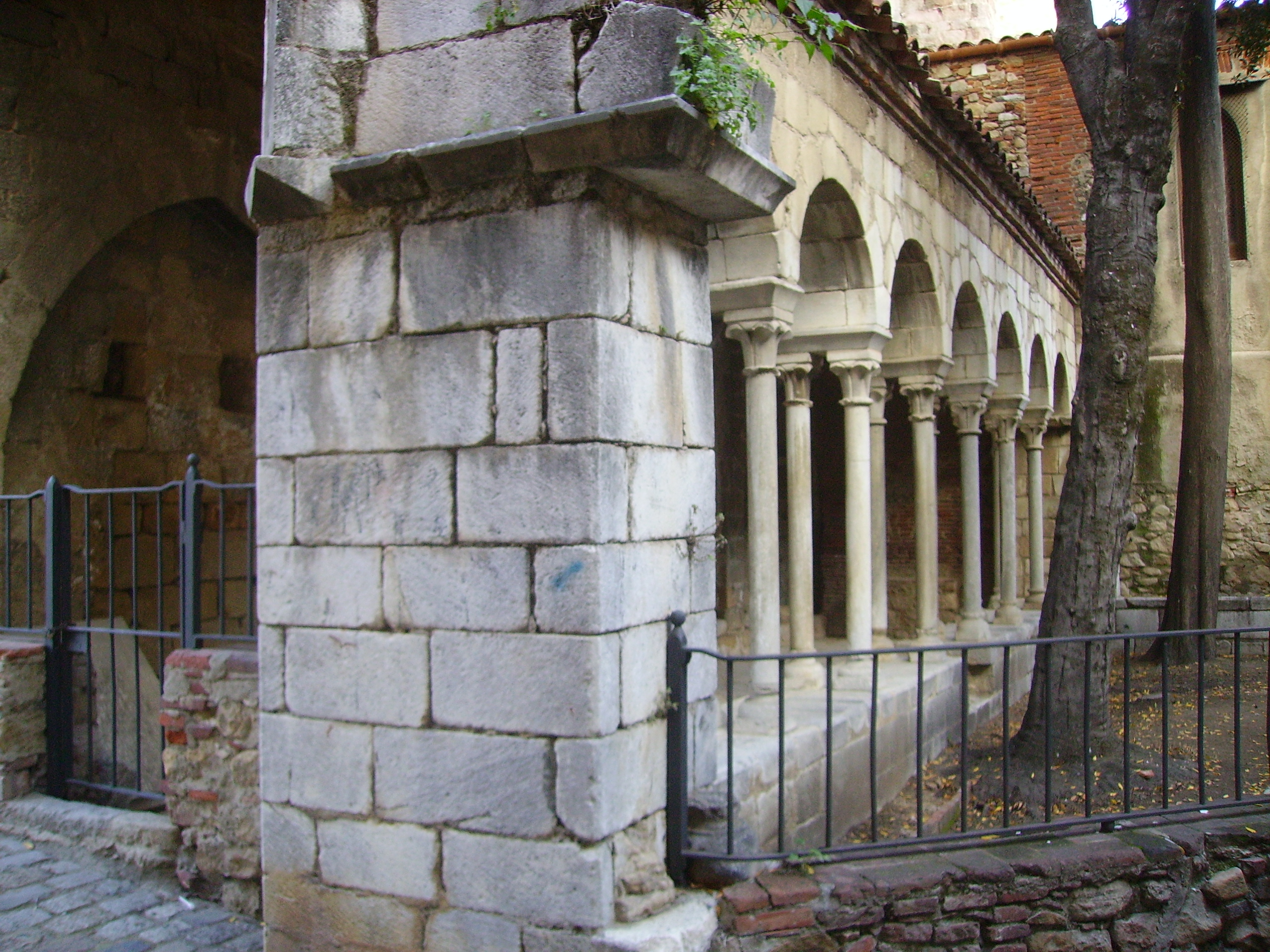 Ala nord del claustre del Monestir de Sant Salvador a Breda, La Selva, Catalunya.